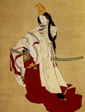 Figur out of Nô-drama "Giô"